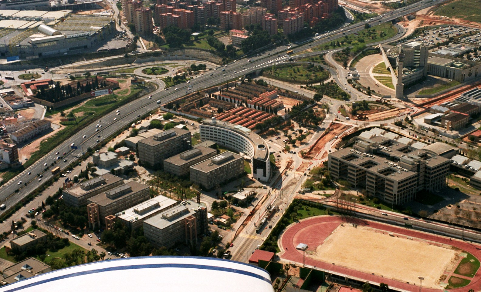 La_Universitat_de_València des de l'aire